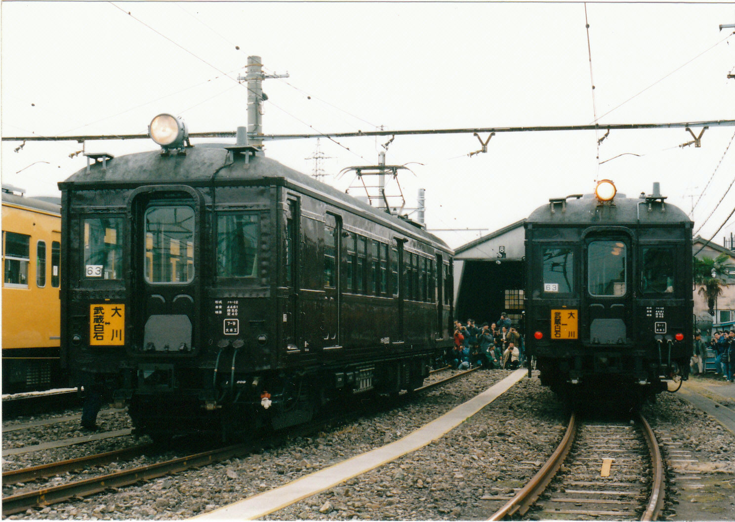 弁天橋電車区（現鶴見線営業所）でのさよならイベントでのクモハ12（1996年3月頃撮影）